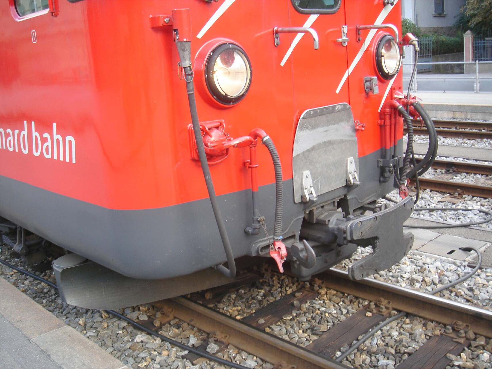 Mittelpuffer mit zwei Schraubenkupplungen (Zp2) am MGB Deh 4/4 22 ex BVZ. Der Mittelpuffer_Kupplungskopf kann gegen eine +GF+-Nebenbahnkupplung (GFN) getauscht werden.